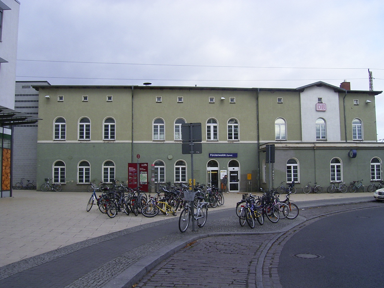 Der Bahnhof in Fürstenwalde/Spree